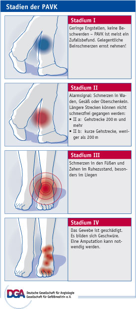 Stadien der PAVK (Schaufensterkrankheit)